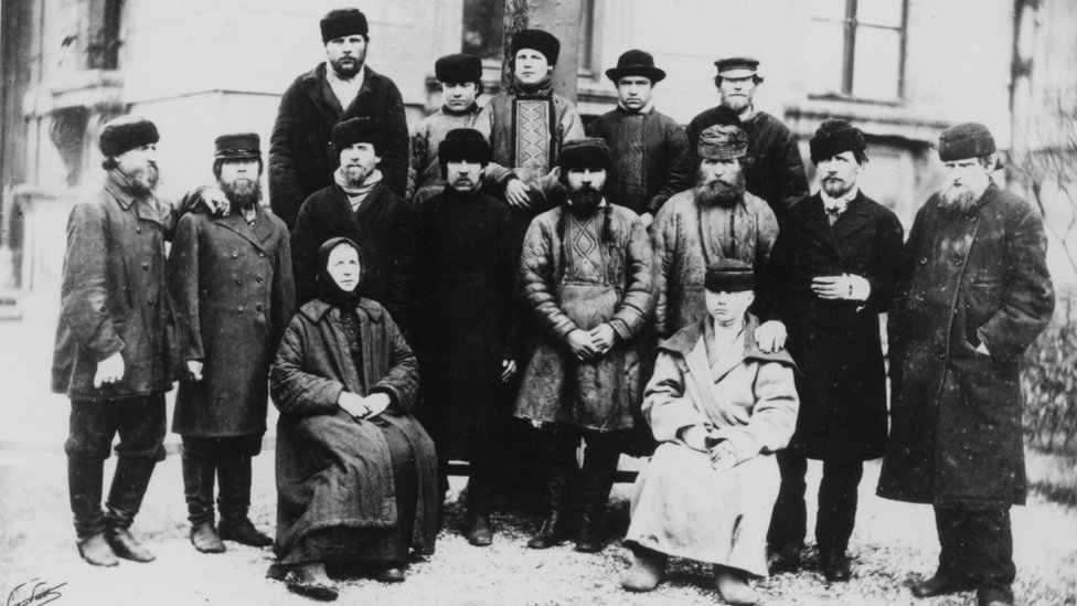 Группа крестьян Смоленской губернии, искусанных бешеным волком, на лечении у Луи Пастера